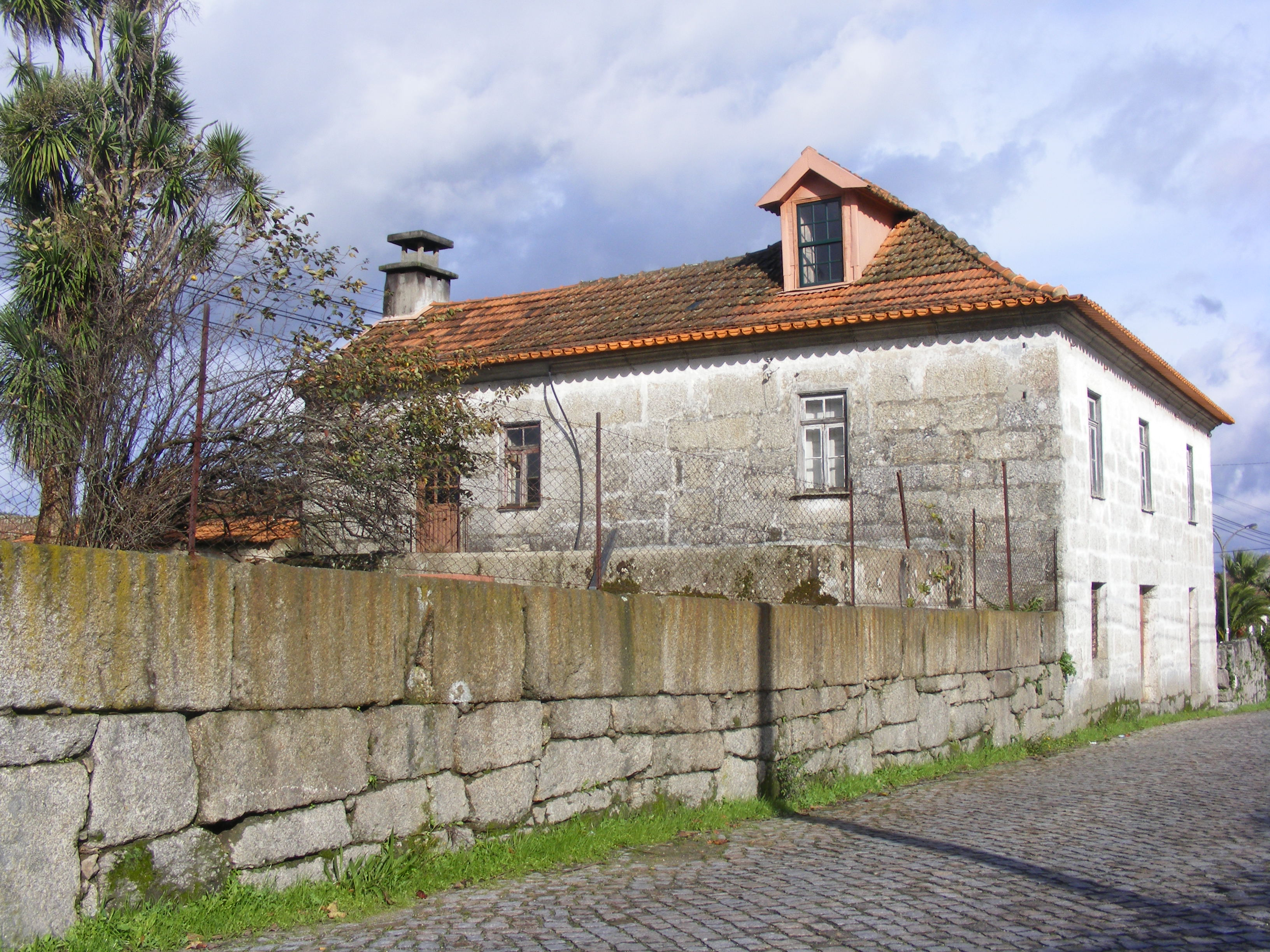 Amarante Casa da Cidreira Fregim